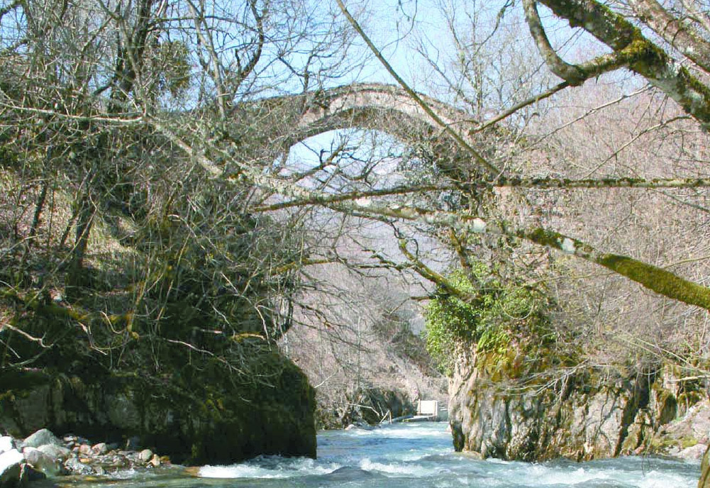 Мостот Еленски скок